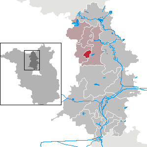 Schönermark in Brandenburg (Country) - District Oberhavel